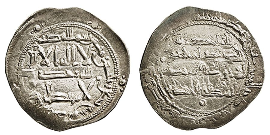 Dírham de Abd-ar-Rahman II de Còrdova, en plata. Encunyada l'any 239 de l'Hègira.